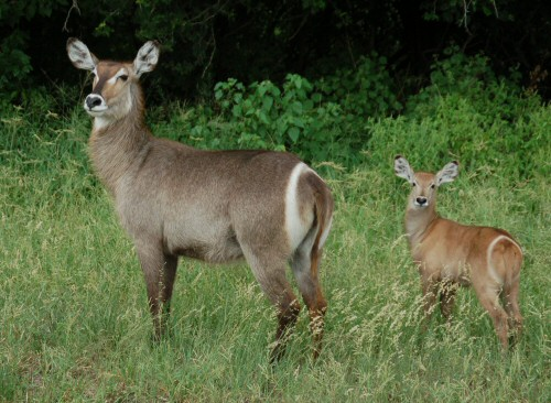 Waterbok gefotografeerd door Arjen Mulder in het Krugerpark, Zuid Afrika